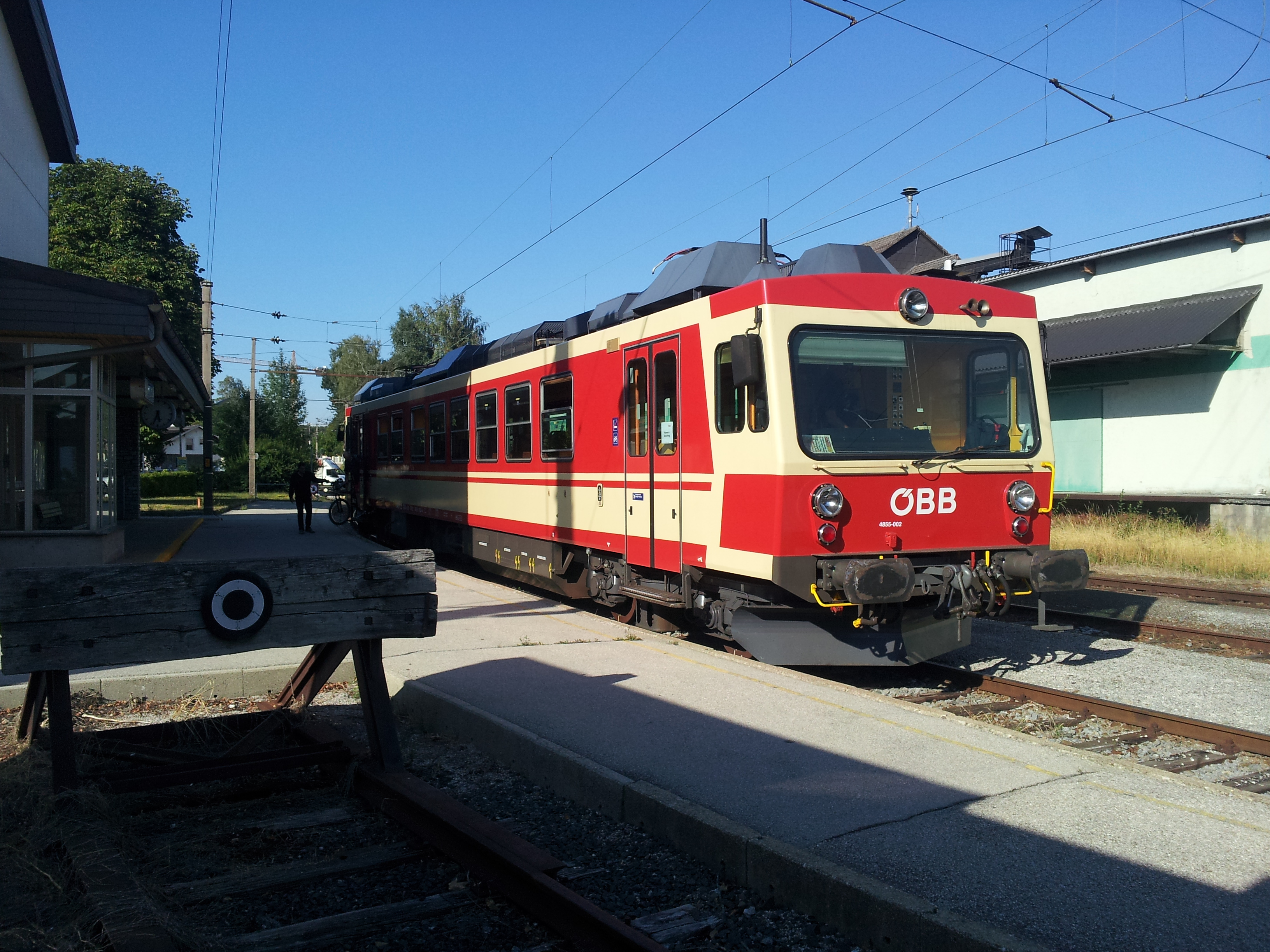 ÖBB 4855 im Einsatz auf der Kammerer Bahn, hier im Bahnhof Kammer-Schörfling